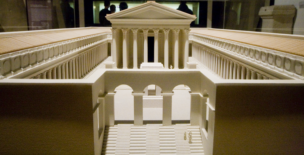 Maquette d'un temple localisé dans le clos du verbe incarné (fouilles de 1957 et de 1979-1980), Musée gallo-romain de Fourvière. Catalogue Archéologique de la Gaule, Lyon 69/2, 2006, p. 531 à 535